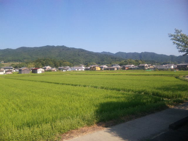 奈良県明日香村にある石神遺跡。埋め戻され田畑になっている。